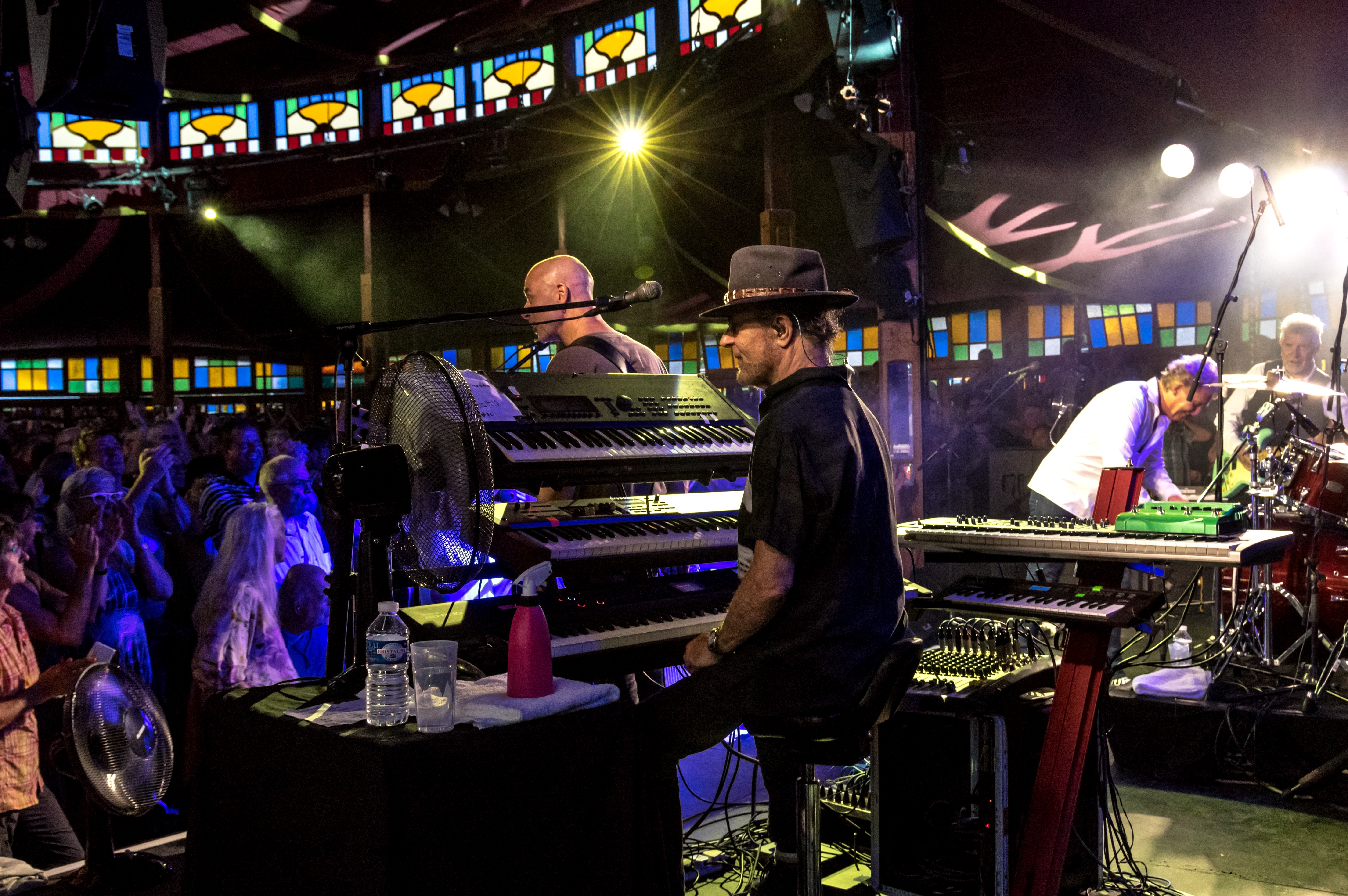 Bilder vom Zelt Musik Festival 2017 in Freiburg im Breisgau